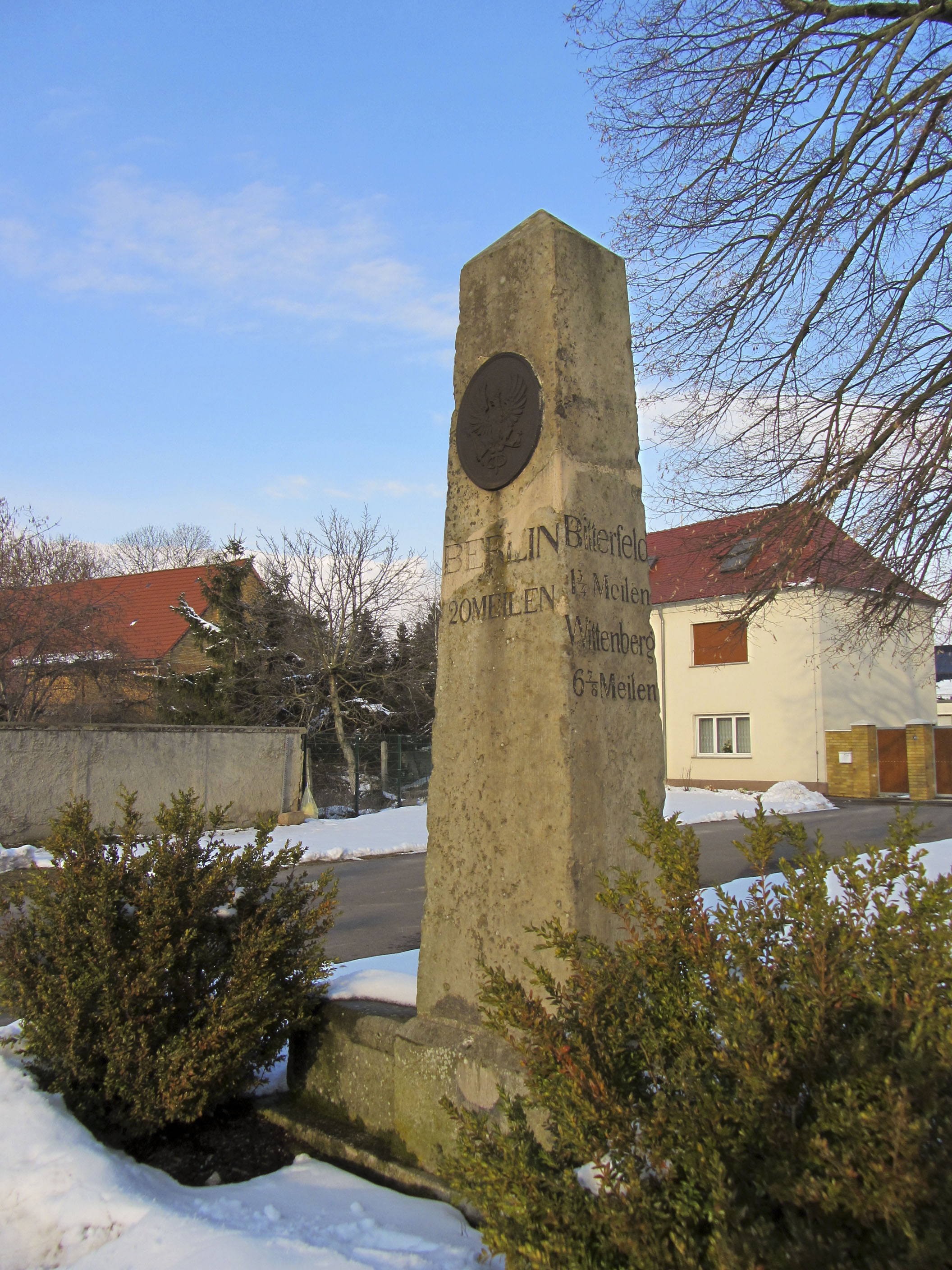 Preußischer Ganzmeilenobelisk in Zschortau